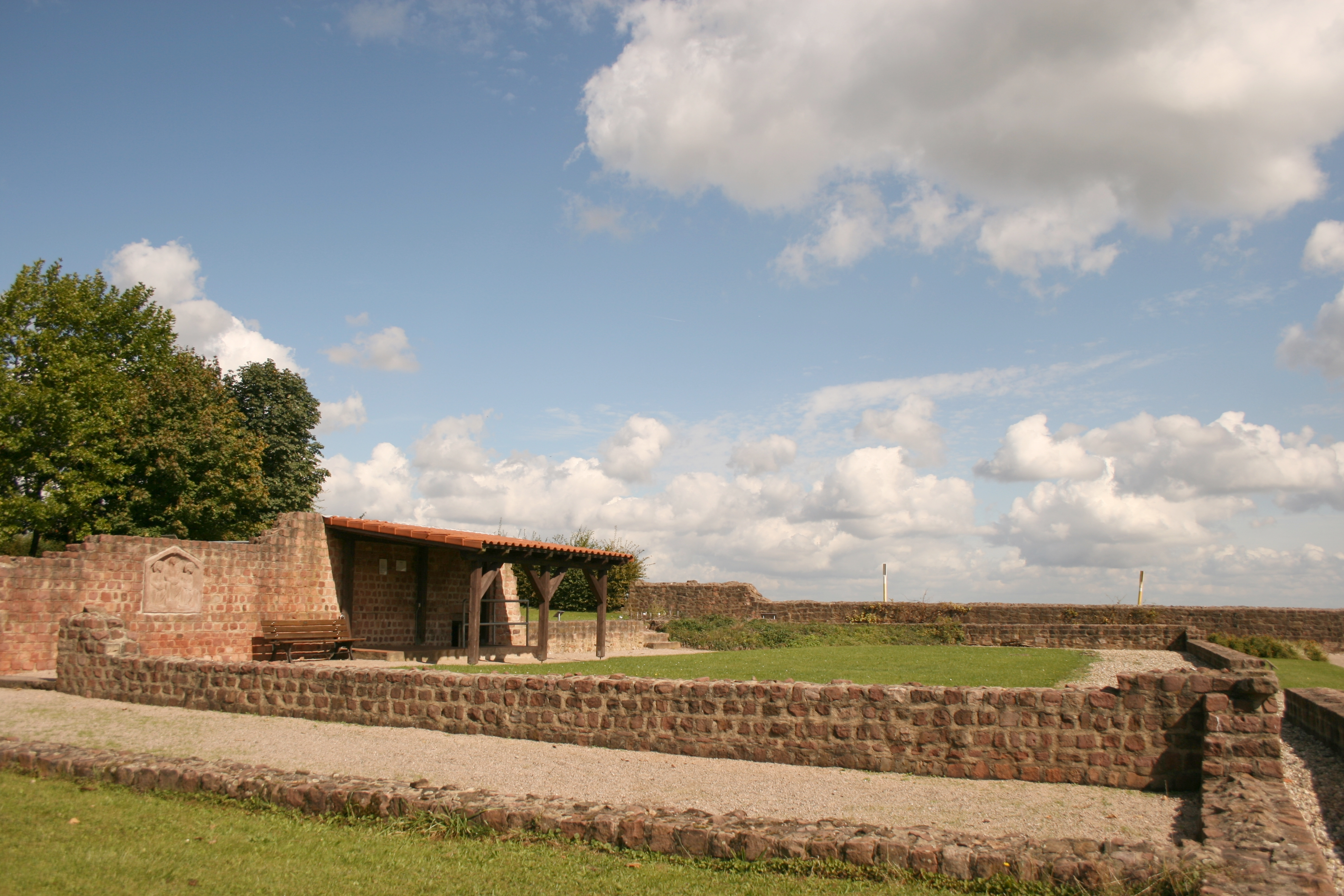 Villa rustica Haselburg, Sogenannter Wirtschaftstrakt von Süden.